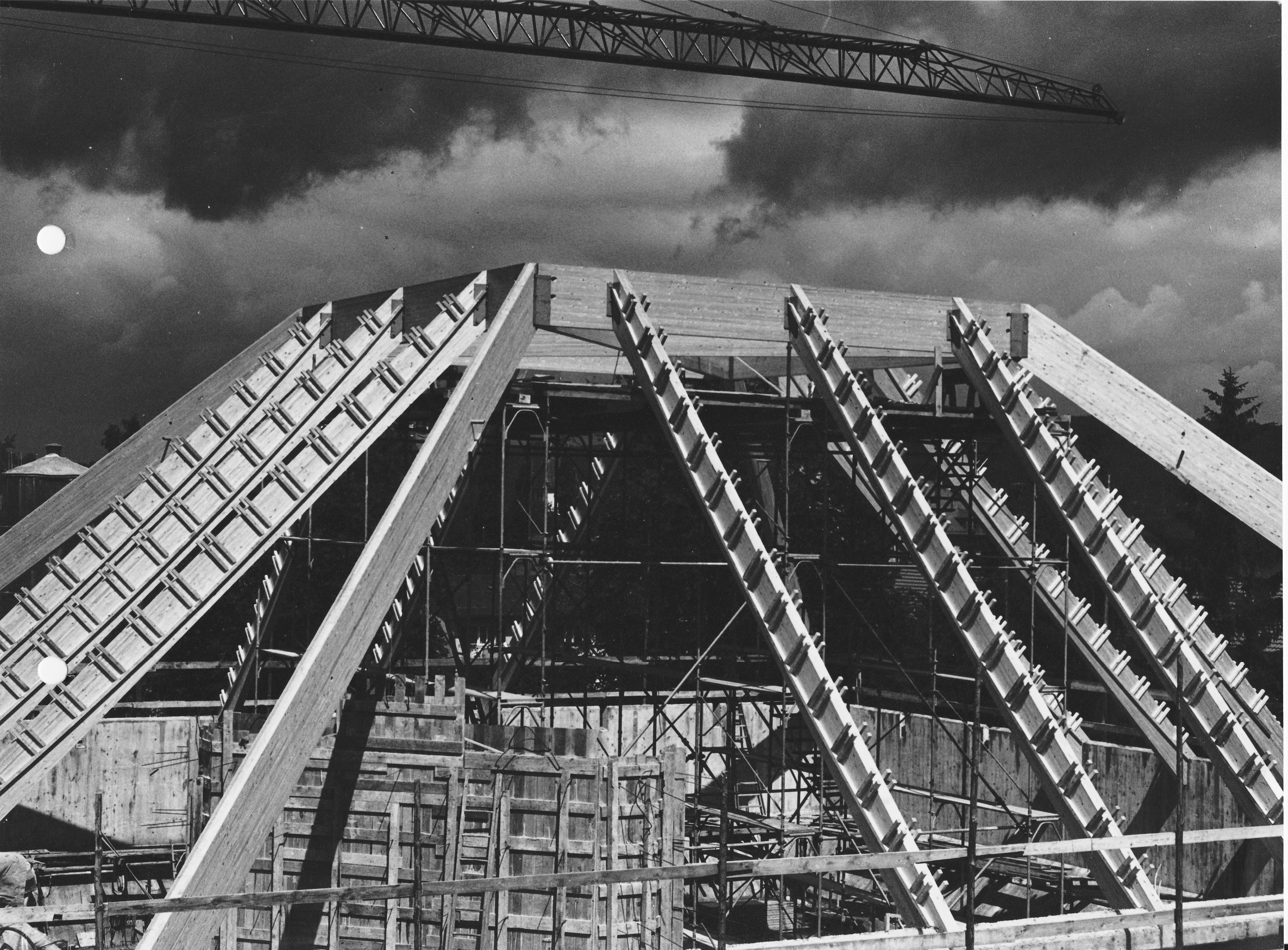 Römisch-katholische Pfarrei Heilig Kreuz Zürich-Altstetten, Dachkonstruktion der neuen Kirche